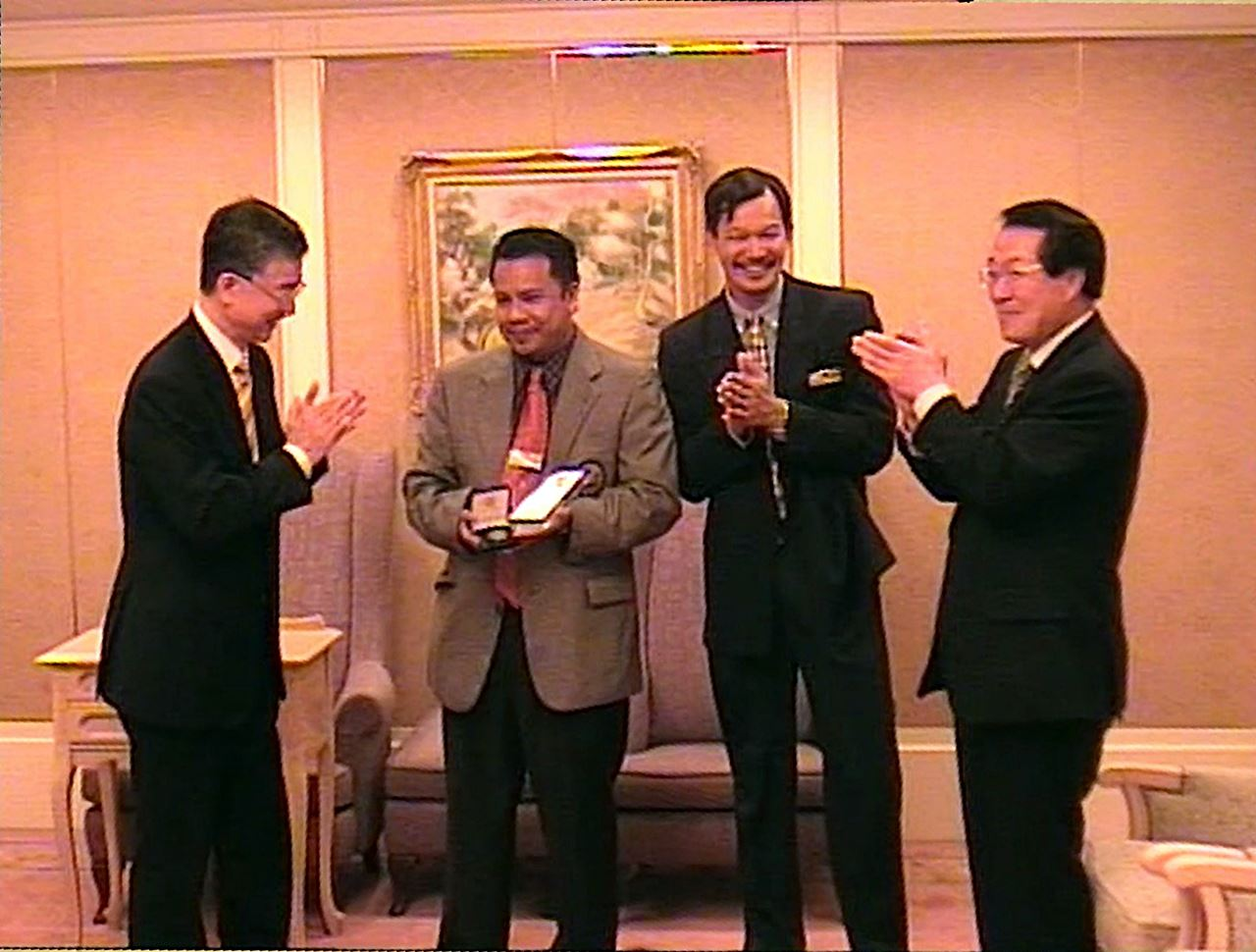 Ismail Ibrahim ketika mengambil hadiah untuk ICDC pada tahun 2005